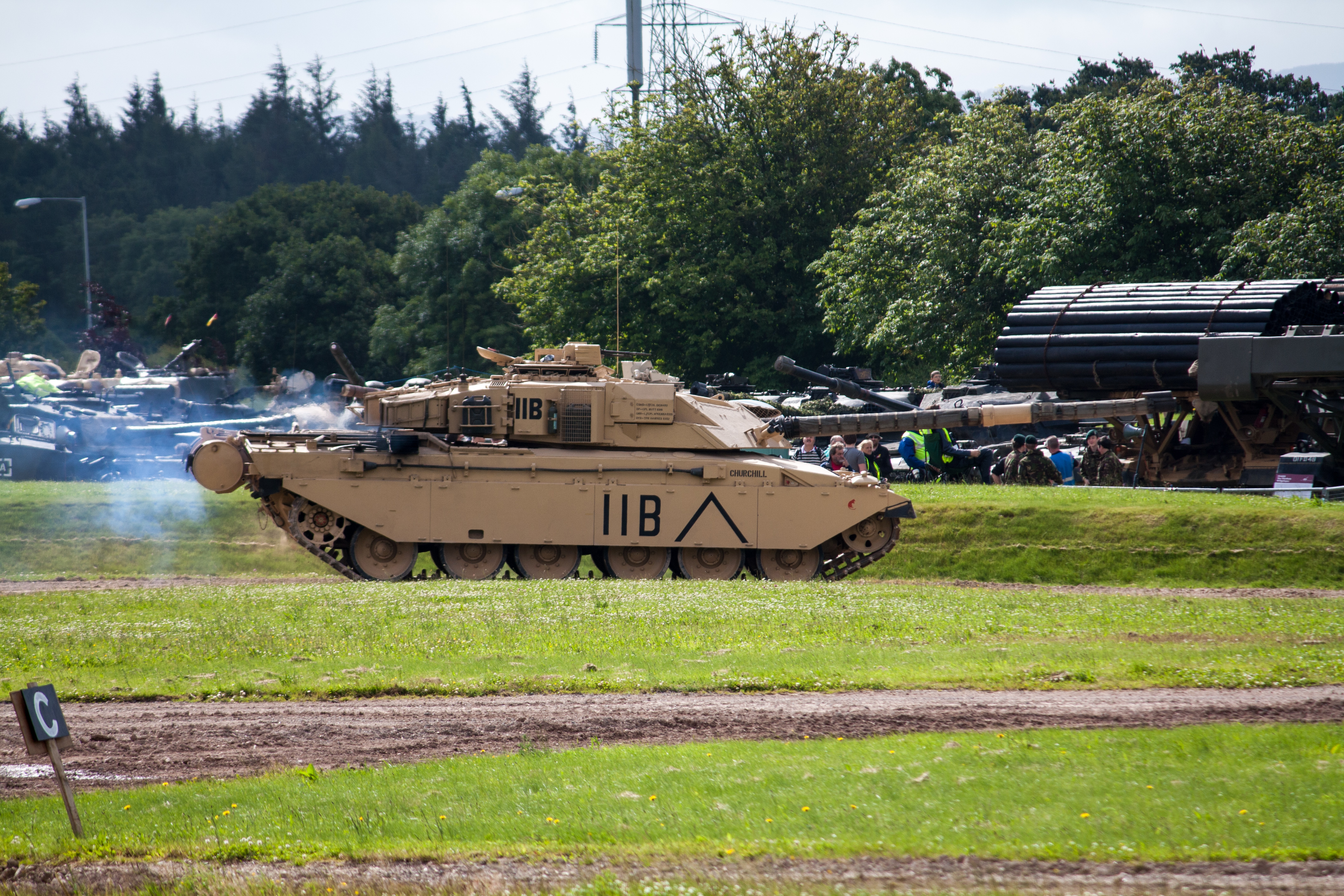 Challenger 1MBT Mk 3